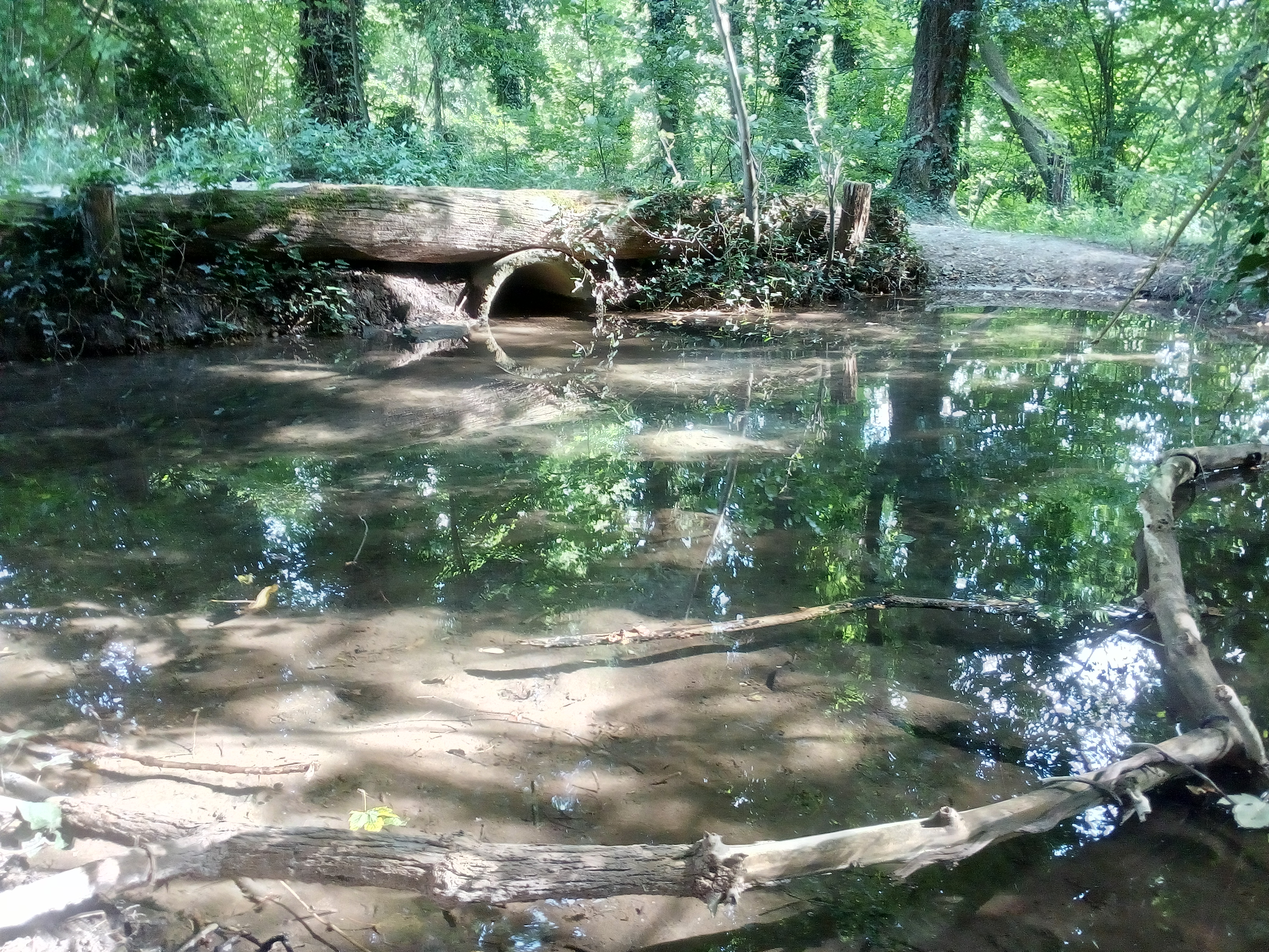 Werrrenhäuslesgraben im Naturschutzgebiet Weingartener Moor